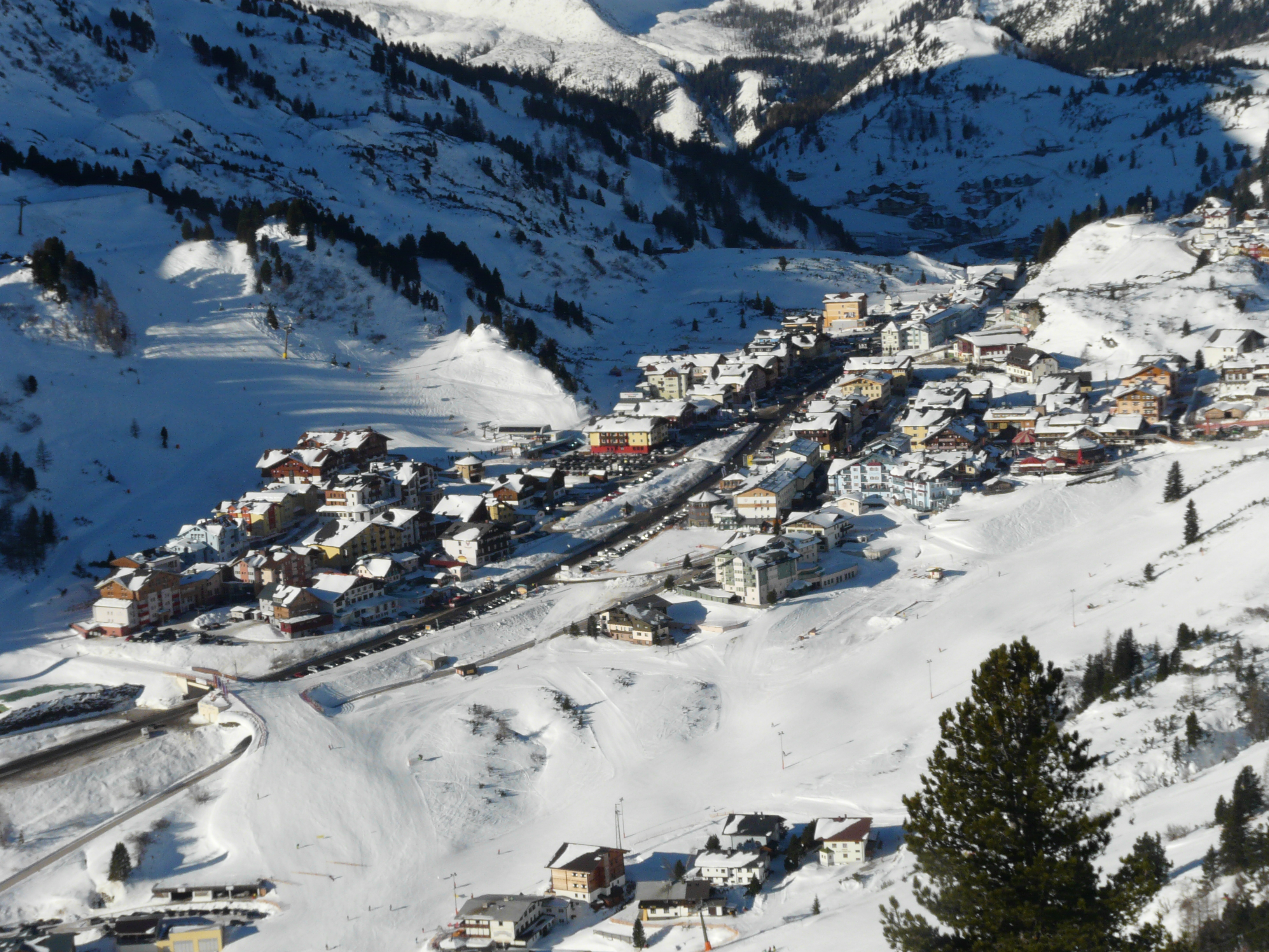 Die Ortschaft Obertauern in den Radstädter Alpen.